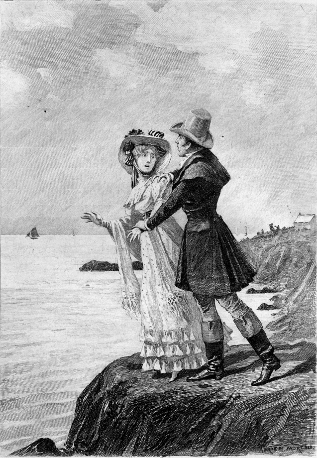 Title page of Honoré de Balzac's Béatrix (1839).